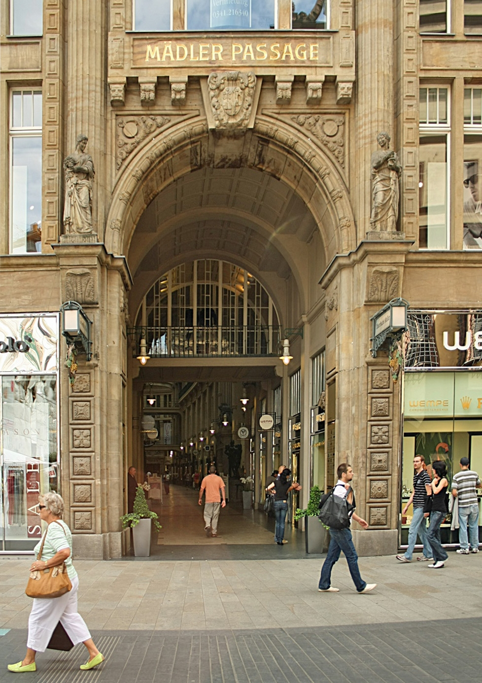 nördlicher Eingang zur Mädlerpassage, zugleich Zugang zur weltbekannte Gaststätte Auerbachs Keller, Grimmaische Str. 2-4, 04109 Leipzig